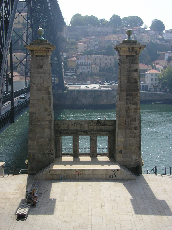 What's left of the suspended bridge (Ponte Pênsil) that used to connect both banks of the river Douro -- Porto and Vila Nova de Gaia --, in the mid-19th century.